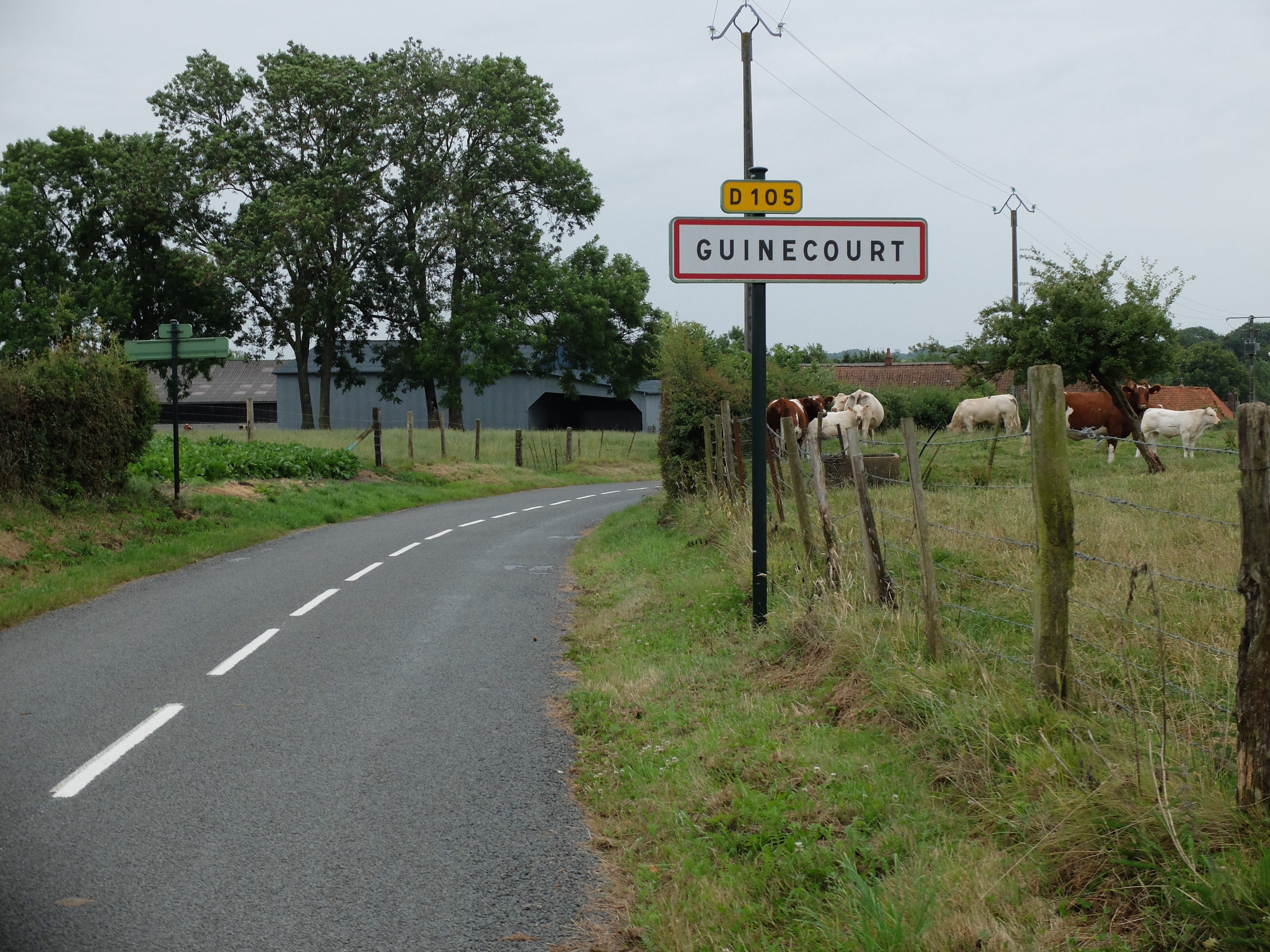 Vue d'une entrée de la commune de Guinecourt.